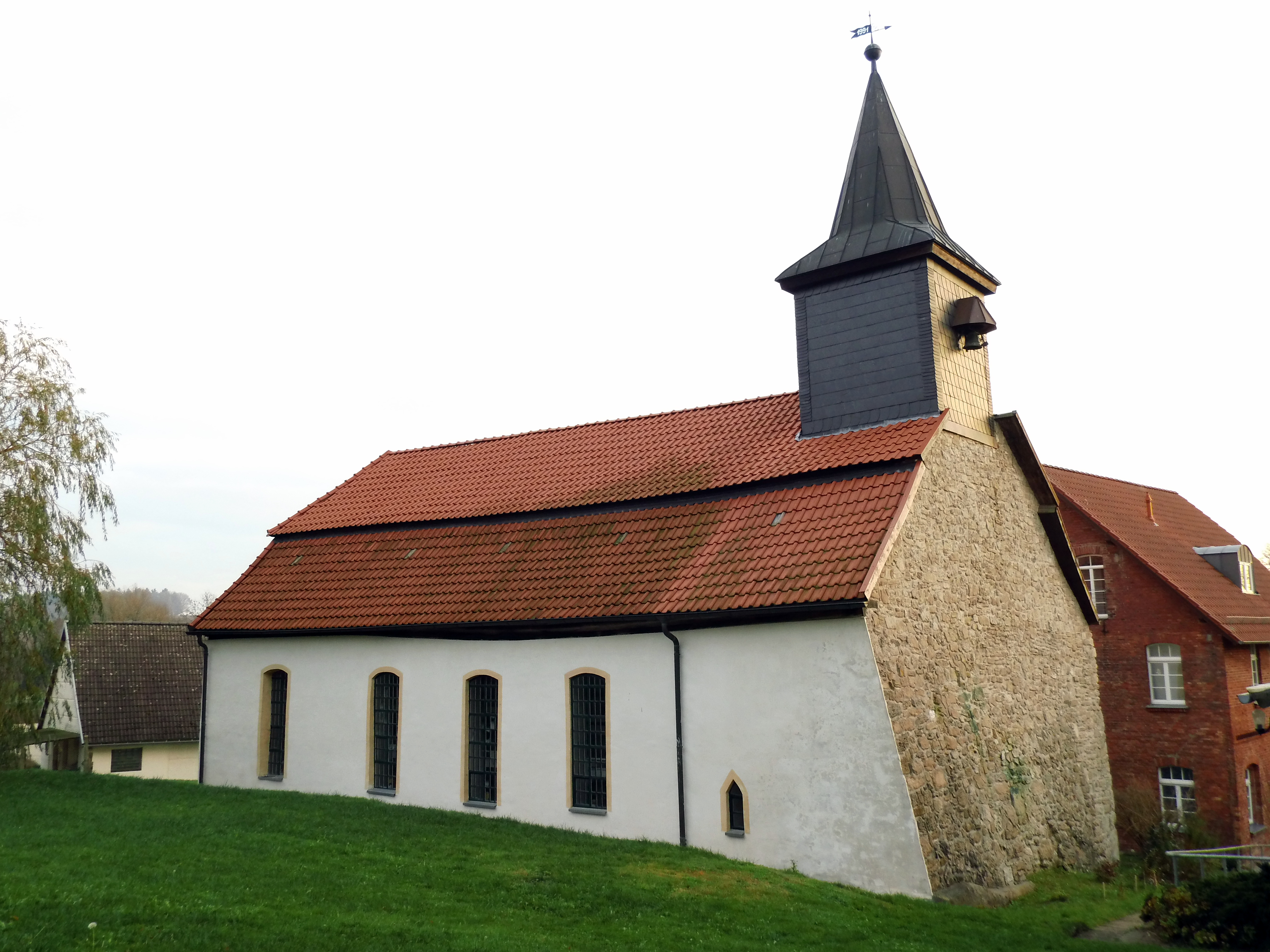 Kirche in Limlingerode - Ansicht vom Pfarrhaus. Foto: Holger Zürch